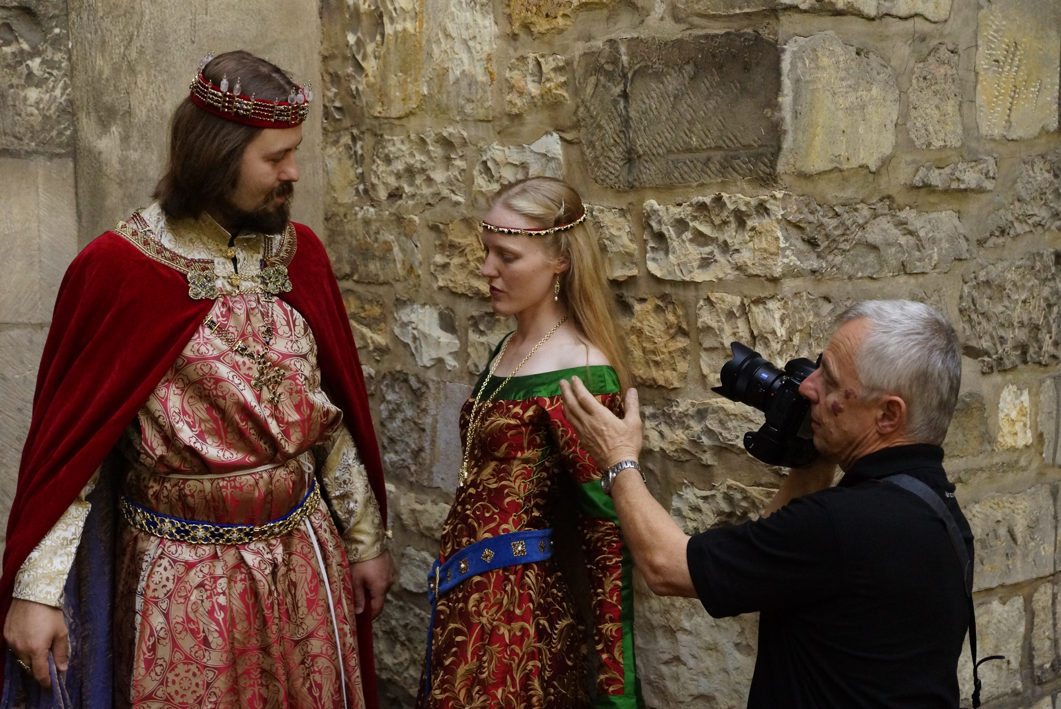 Petr Šálek fotografuje portréty, Emauzy Kostel Panny Marie na Slovanech, Praha, Petr Šálek s fotoaparátem.